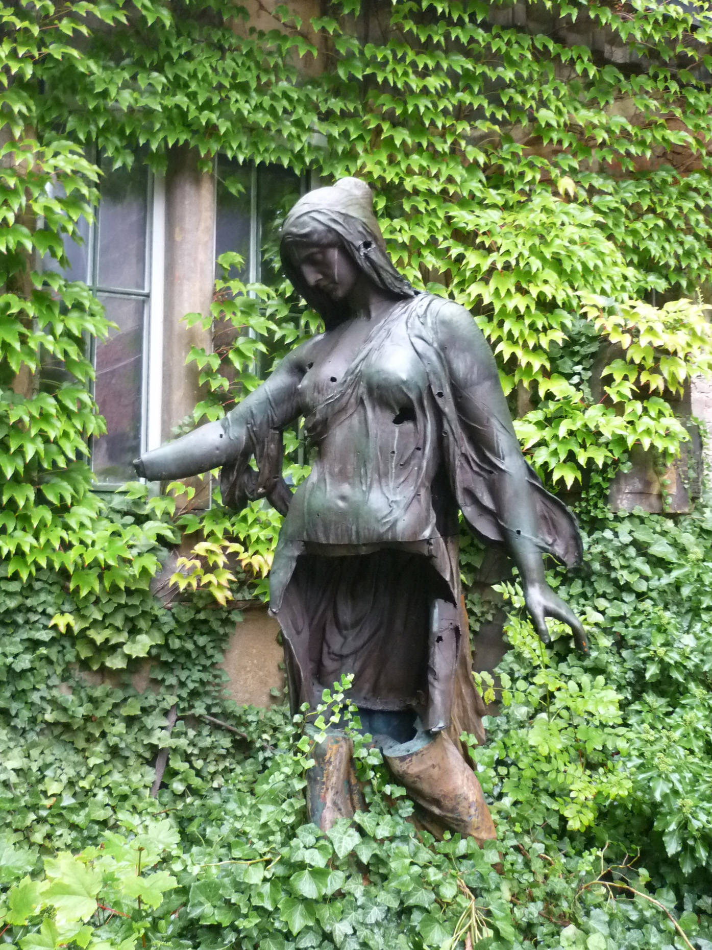 Lapidarium in der Alten Zionskirche in Dresden-Südvorstadt (aufgenommen am Tag des offenen Denkmals 2014): Beschädigte Plastik "Ernst" vom Mozartbrunnen in Dresden (von Hermann Hosaeus)